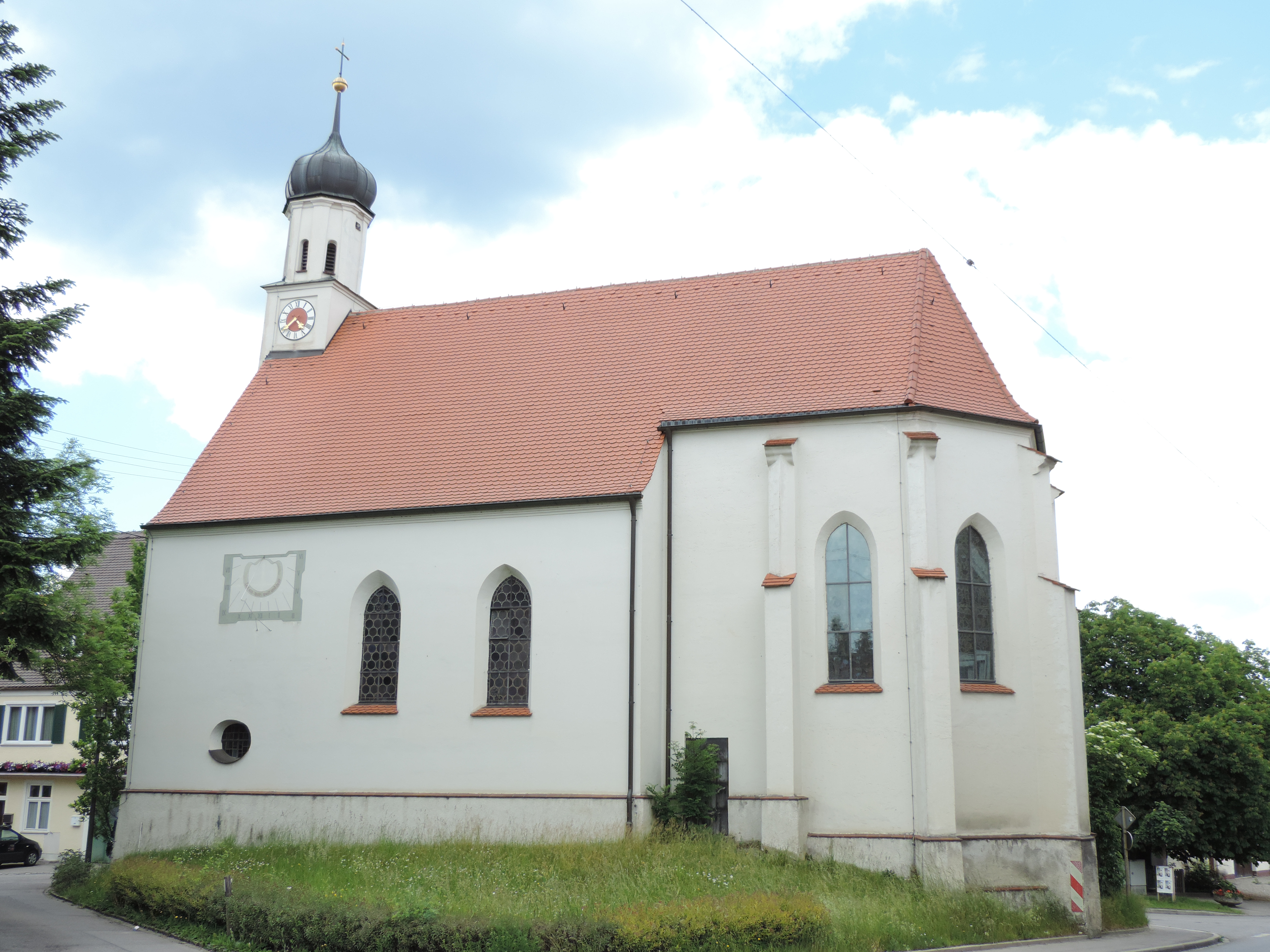 Südansicht